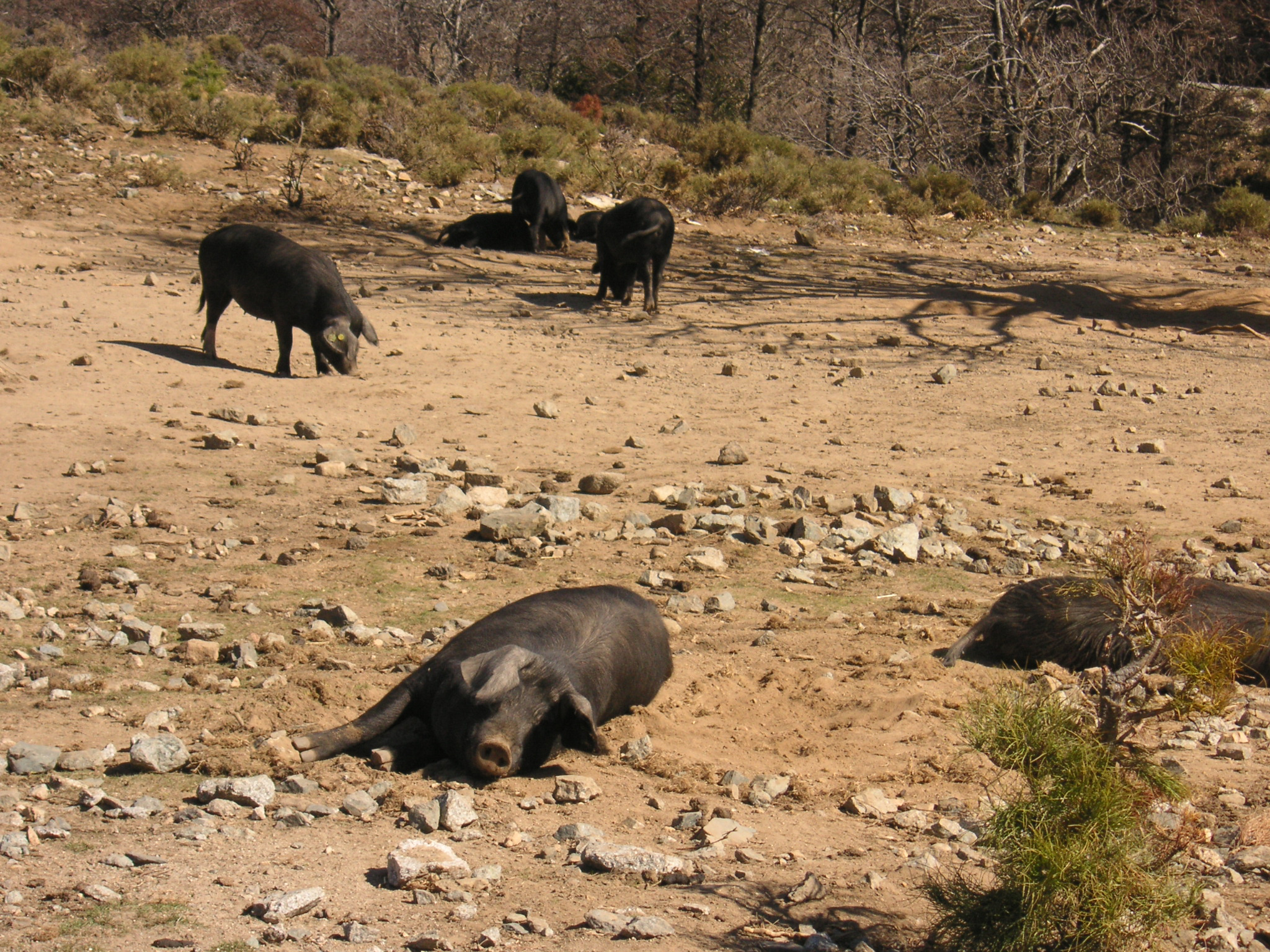 cochons sauvages au bord de la route